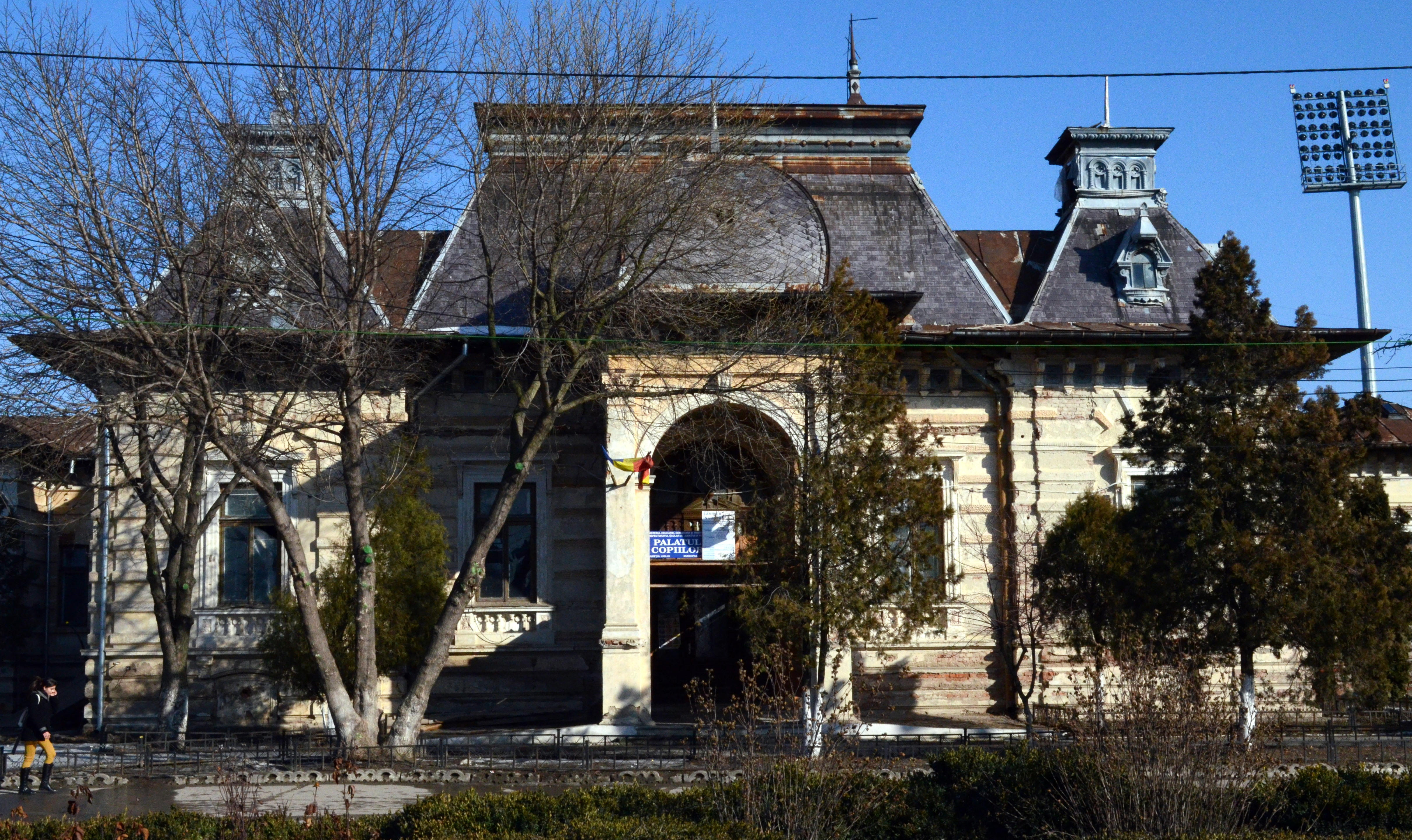 Casa Mavrocordat, azi Palatul Copiilor (Str. Ștefan cel Mare nr. 62, Vaslui)